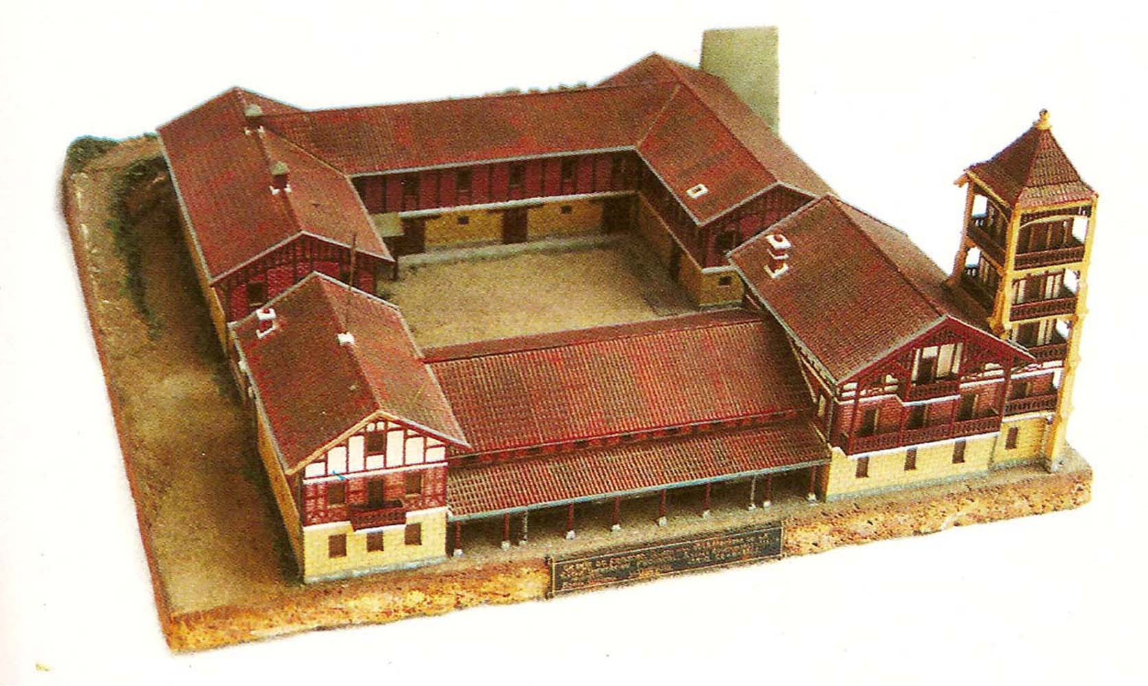 Fraisoroko etxe-ereduaren proiektua